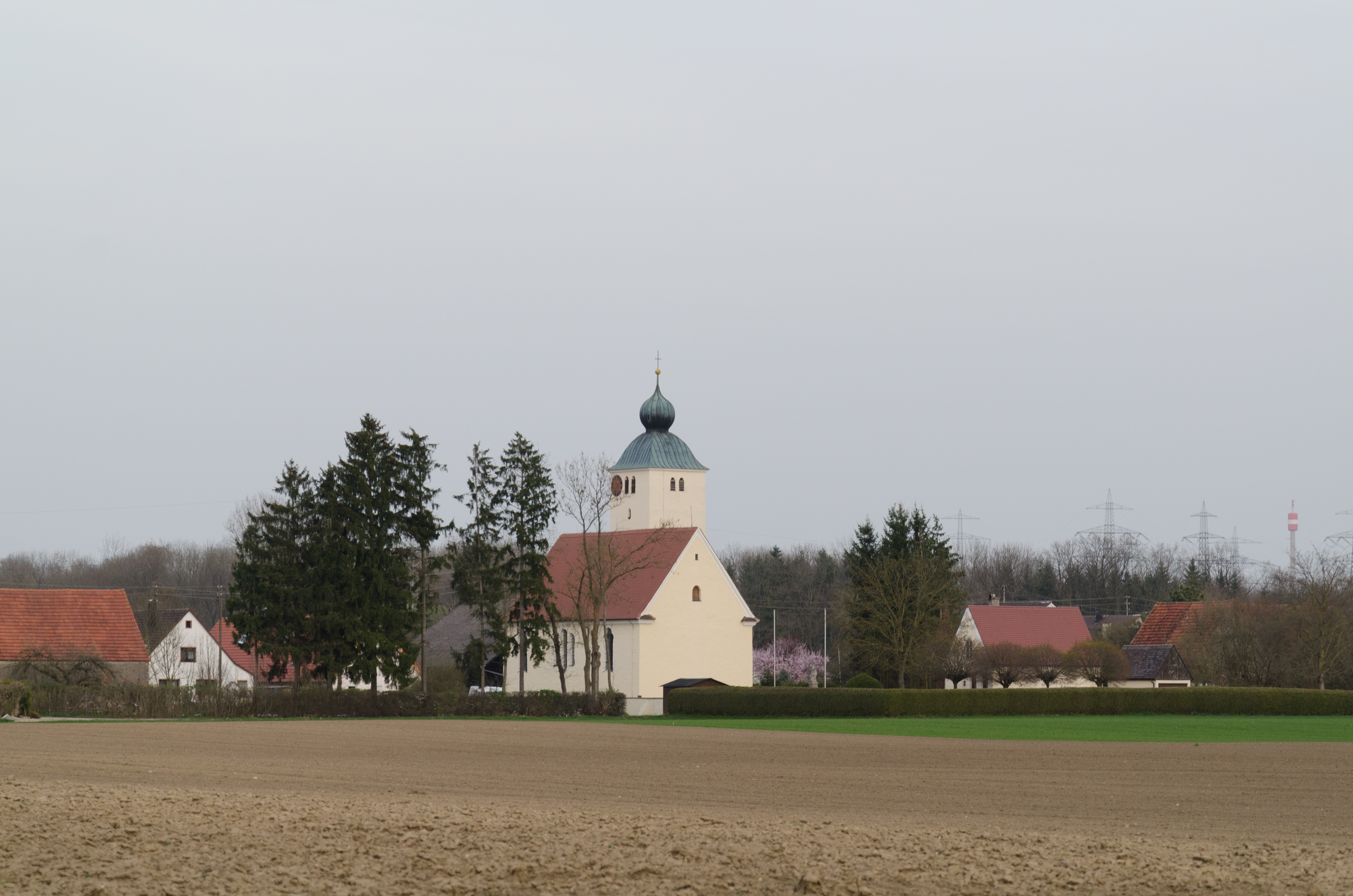 Gundelfingen, Peterswörth, Kath. Pfarrkirche St. Peter und Paul